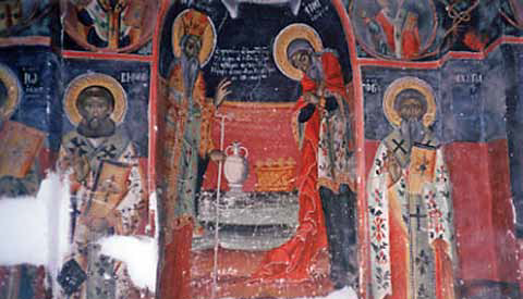 Живопис в дяконикона в църквата "Света Параскева" в Самарина